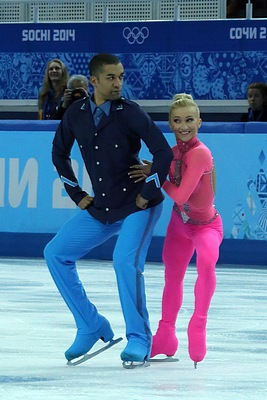 Алена Савченко и Робин Шолковы на Зимних Олимпийских играх 2014 (короткая программа)